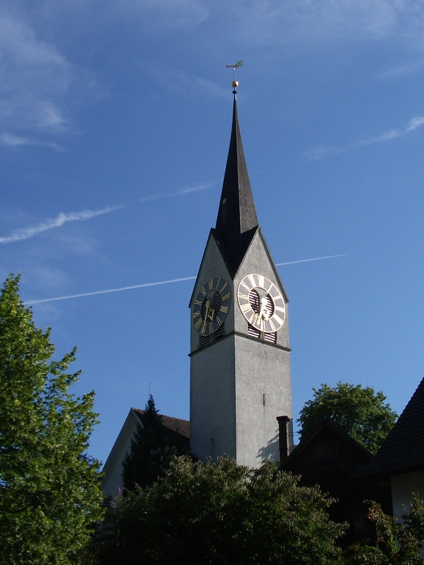 Hausen am Albis ZH, Switzerland